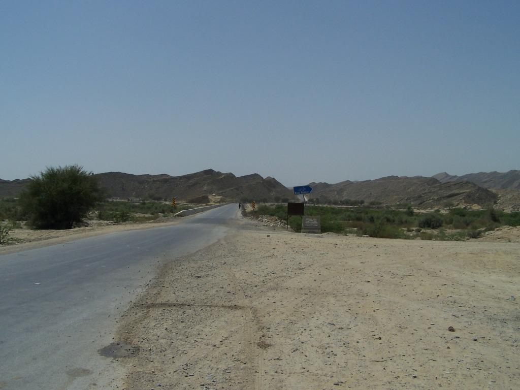 Nani ki Mandir